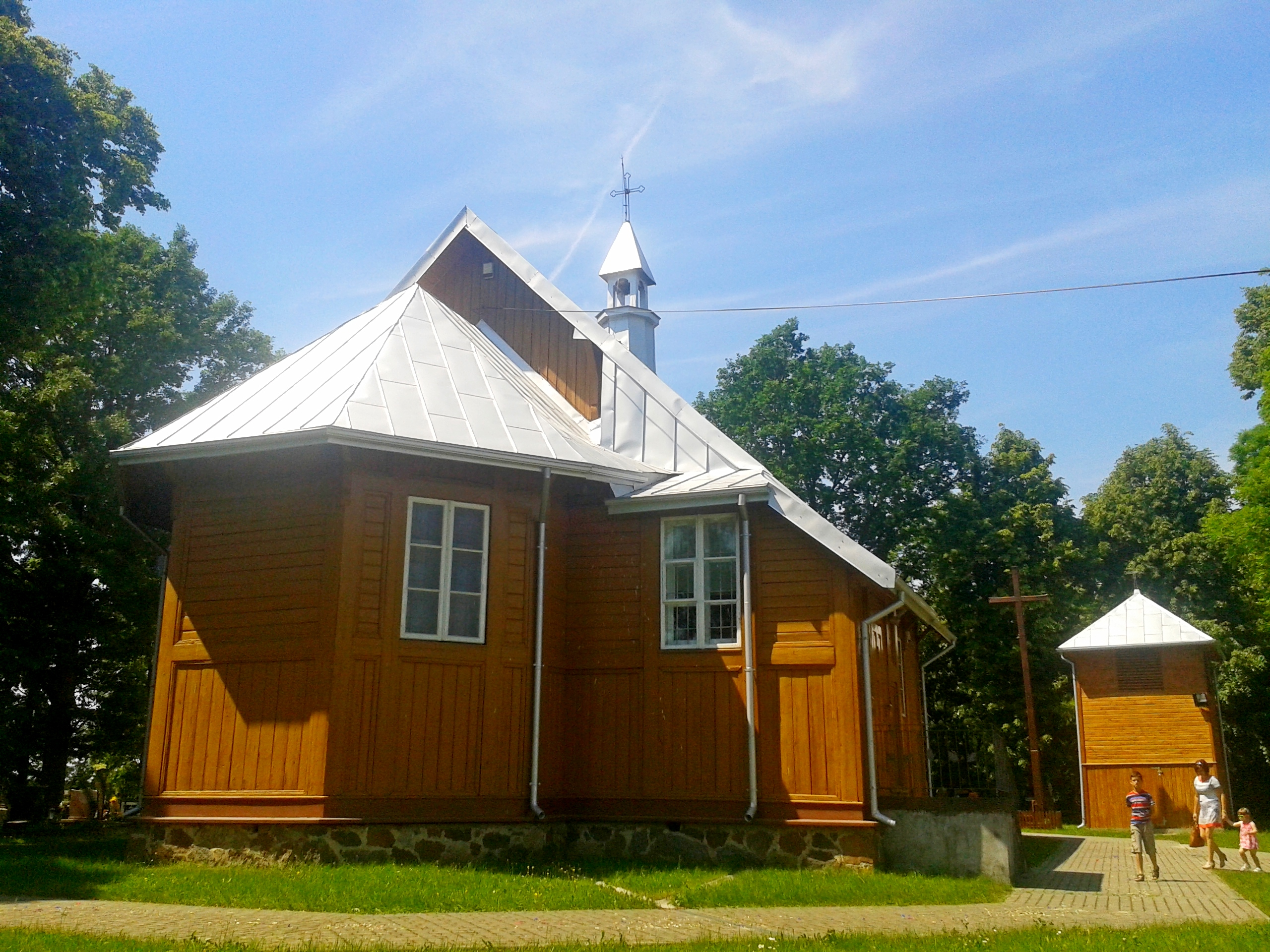 Dawna cerkiew w Woskrzenicach Dużych